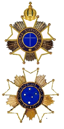 Eigen tekening Robert Prummel